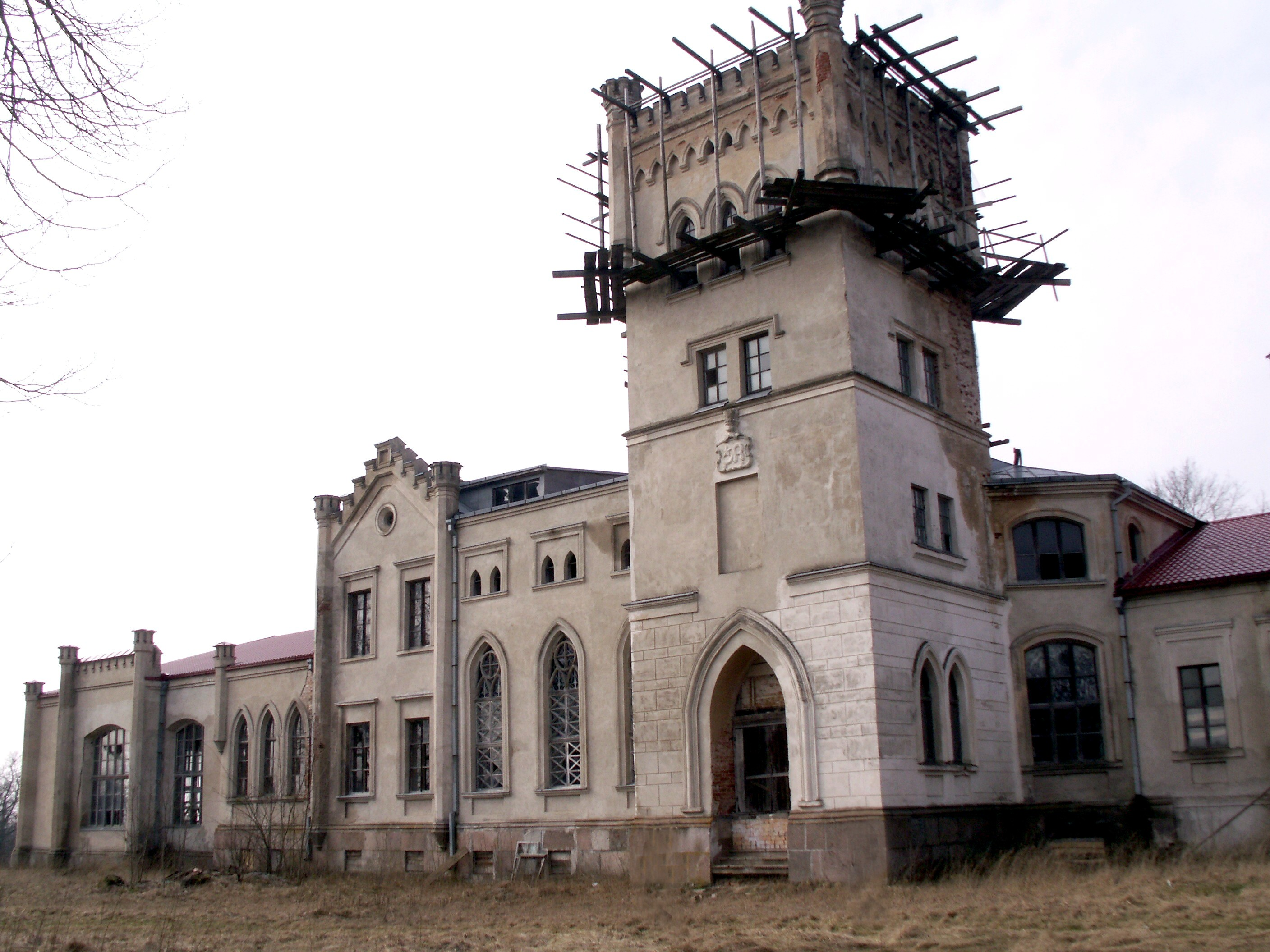 Beržėnų dvaras